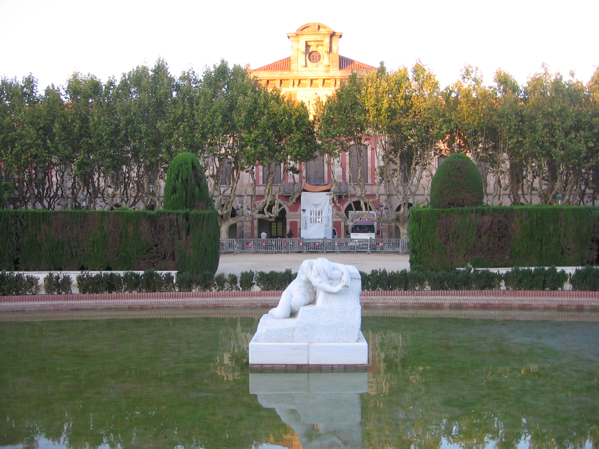 Desconsuelo, de Josep Llimona (Parque de la Ciudadela).